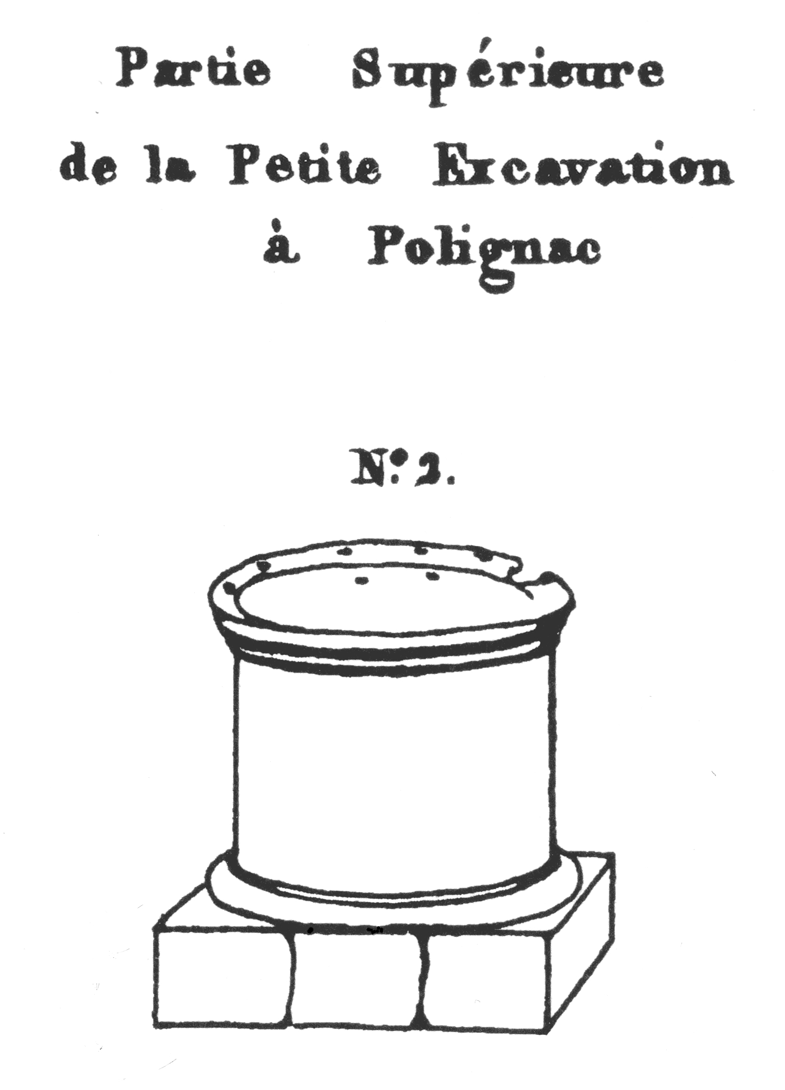 Partie supérieure de la petite excavation à Polignac (Haute-Loire) / Upper part of the small cavity at Polignac, Haute-Loire